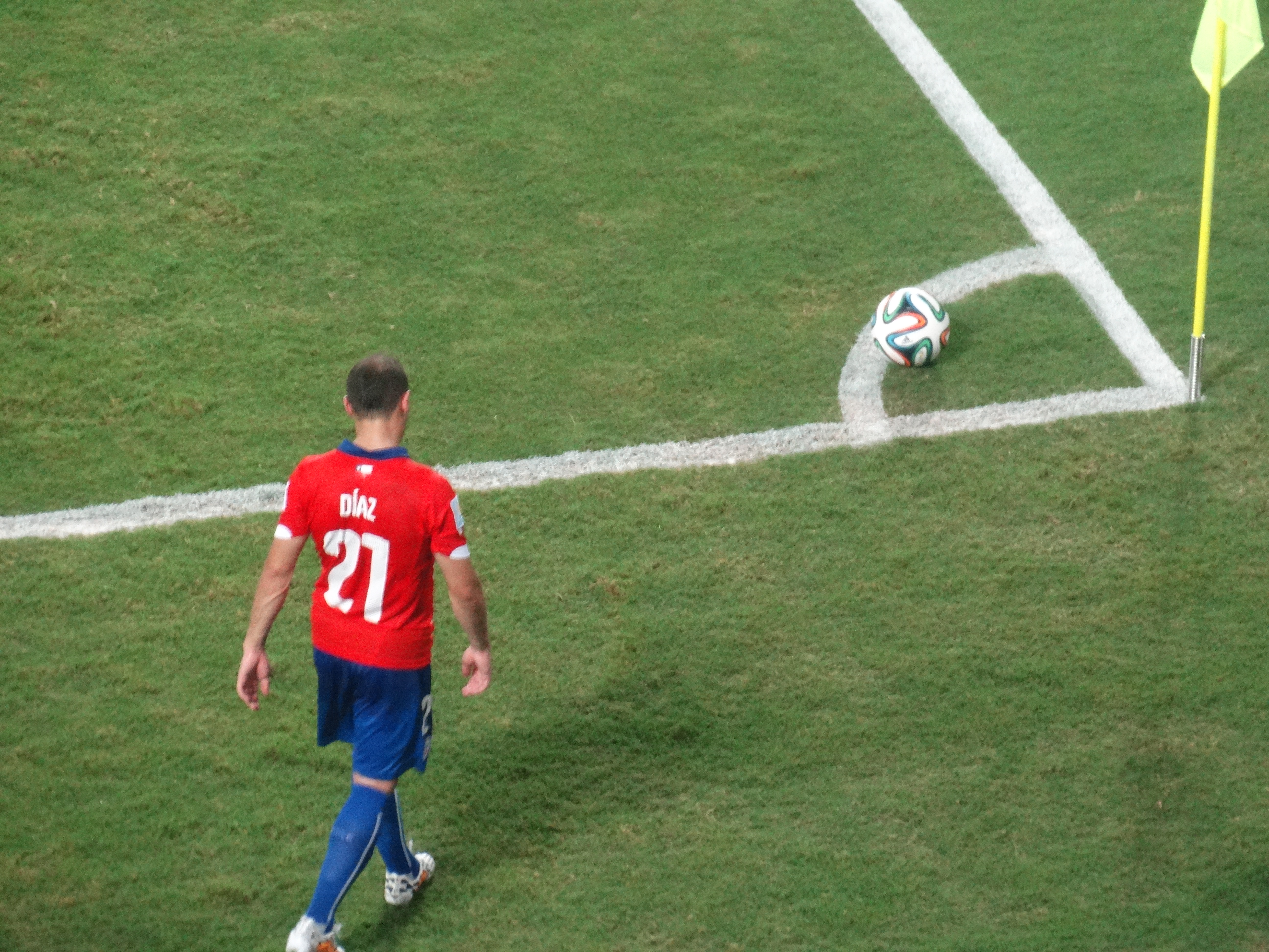 Marcelo Díaz en el primer tiempo frente a la Selección de Fútbol de Australia